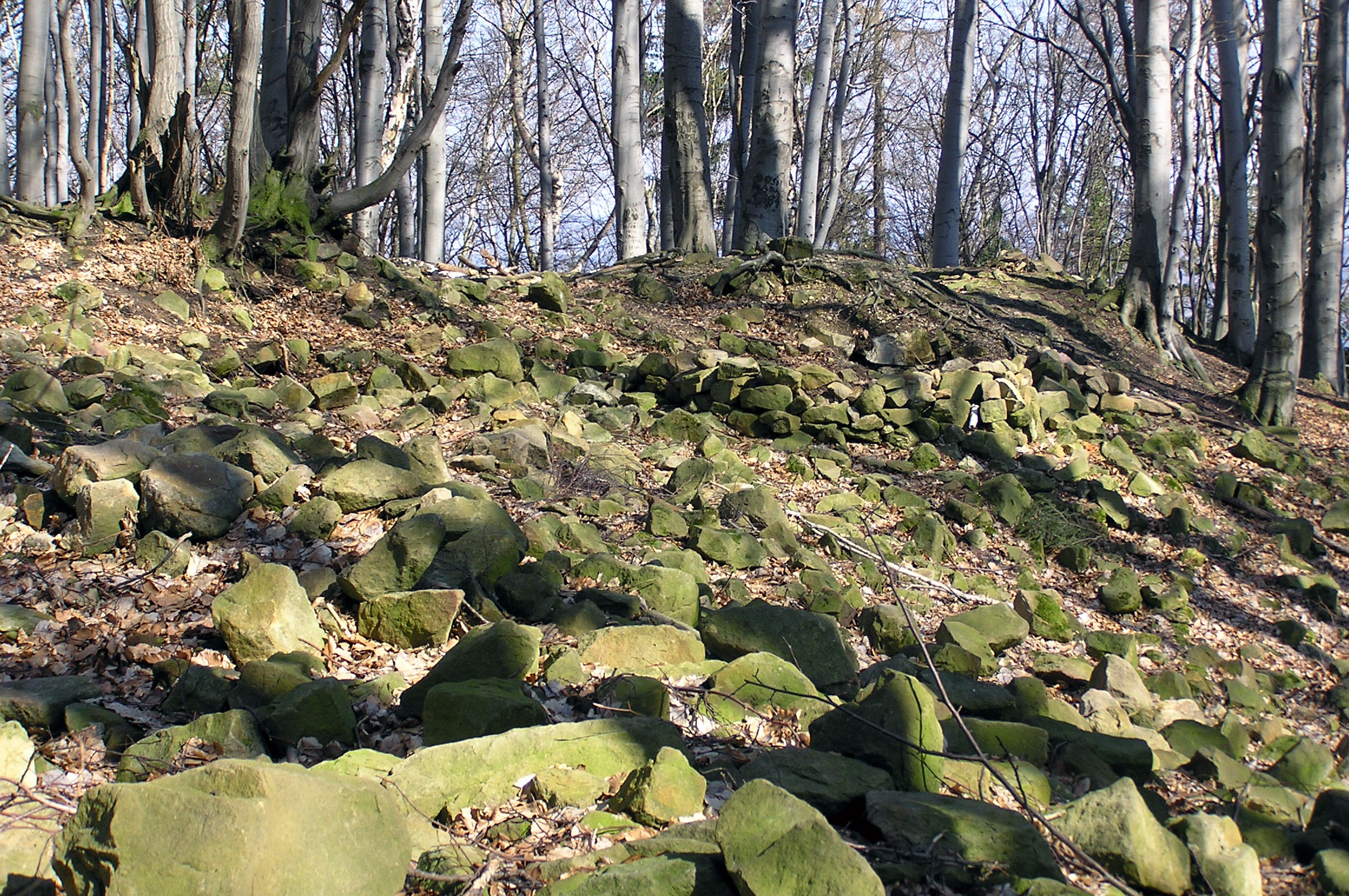 Trosky hradu Starý Světlov